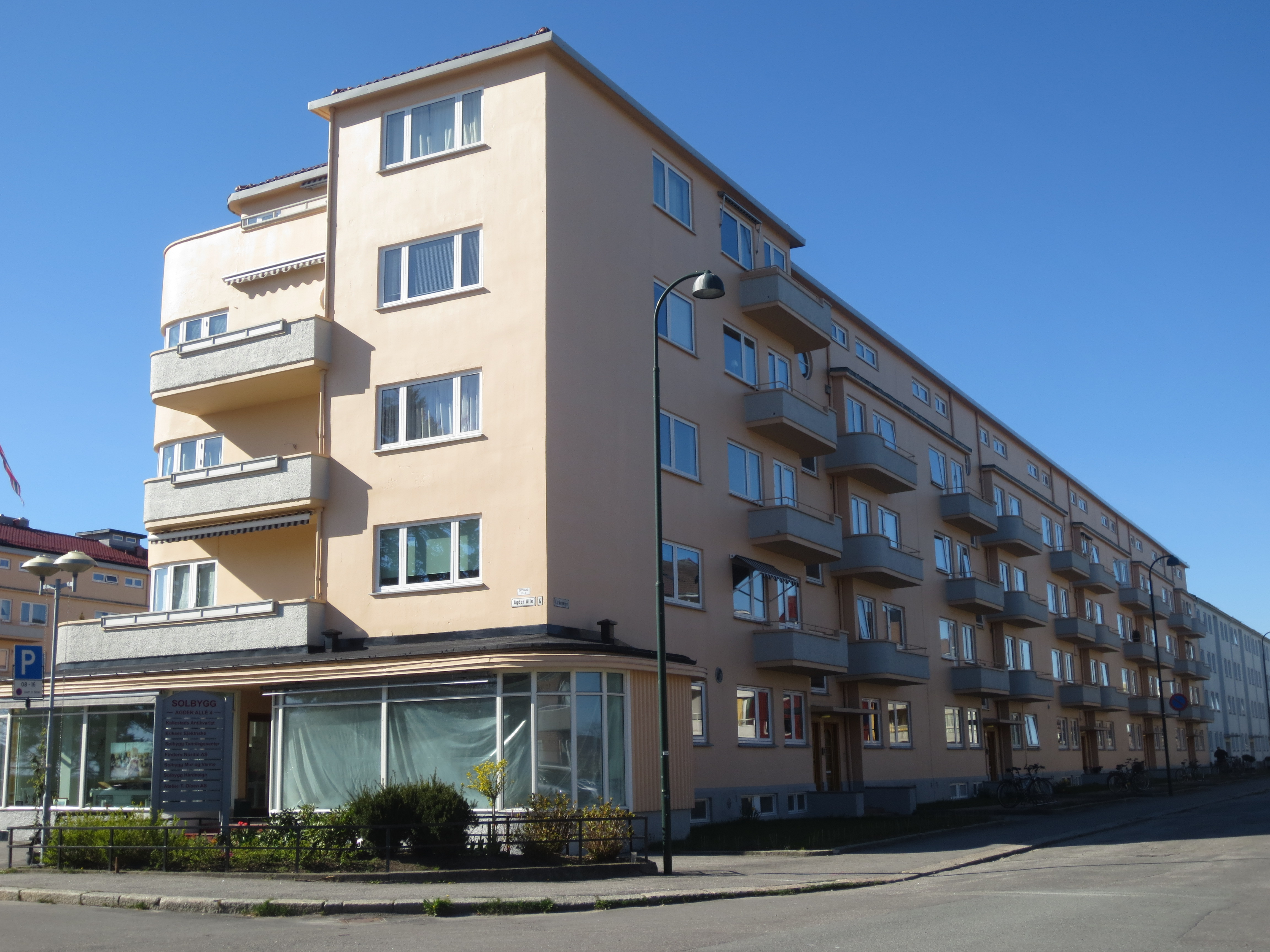 Solbygg i Kristiansand er det største Bauhaus-komplekset i norsk arkitektur, og forskriftsfredet. Det er tegnet av arkitekten Thilo Schoder, som flyktet til Kristiansand da Hitler stengte Bauhaus-skolen i Dessau. Schoder har tegnet en rekke boliger i byen, blant annet unike Bauhaus-inspirerte bygninger i tre. Solbygg ligger på Lund.